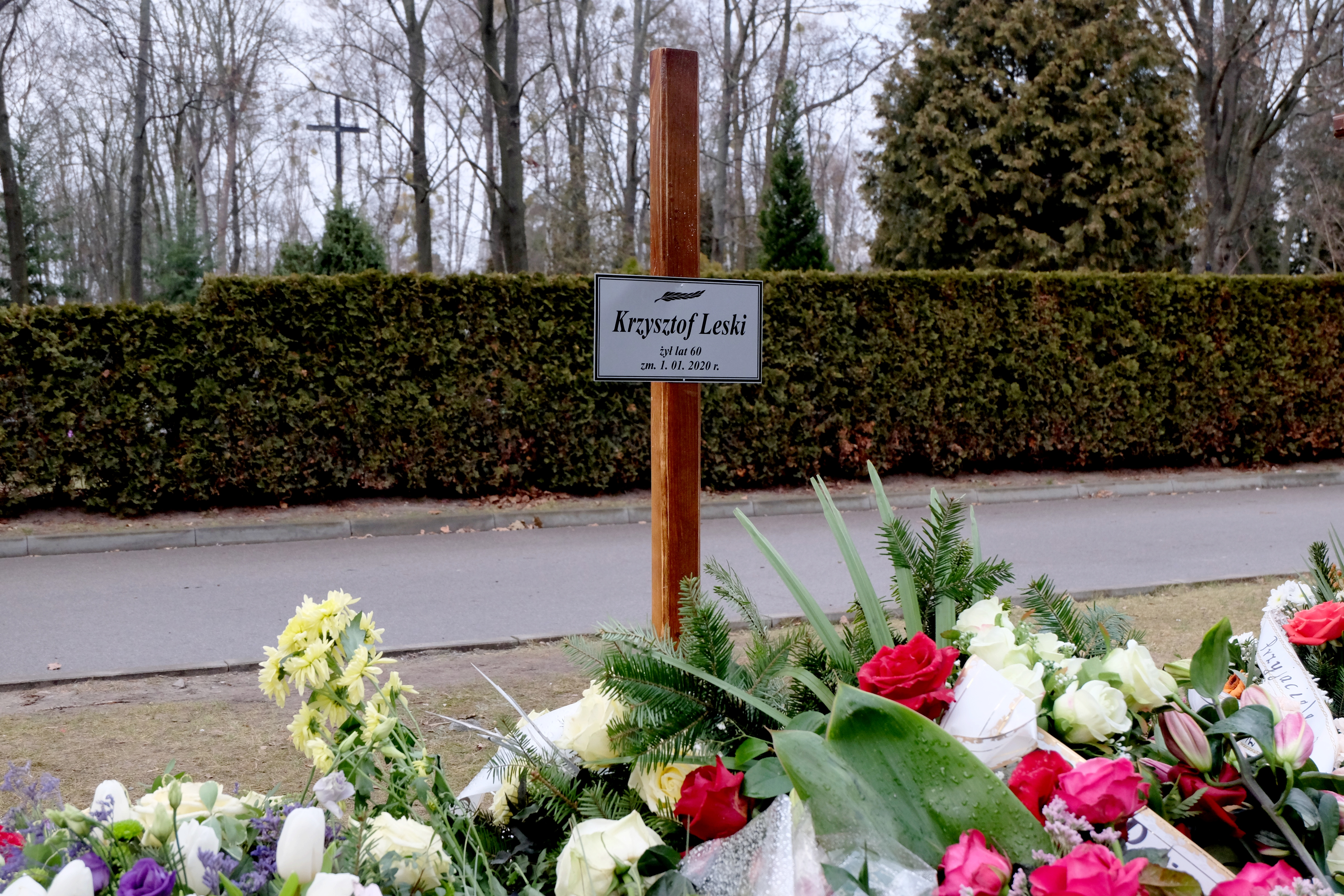 Grób dziennikarza Krzysztofa Leskiego na Cmentarzu Wojskowym na Powązkach w Warszawie